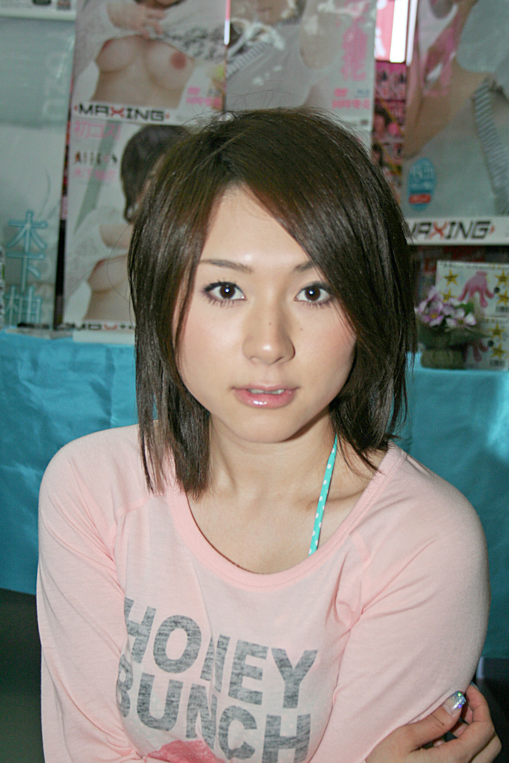 木下柚花。兵庫県姫路市で行なわれたサイン会にて撮影。